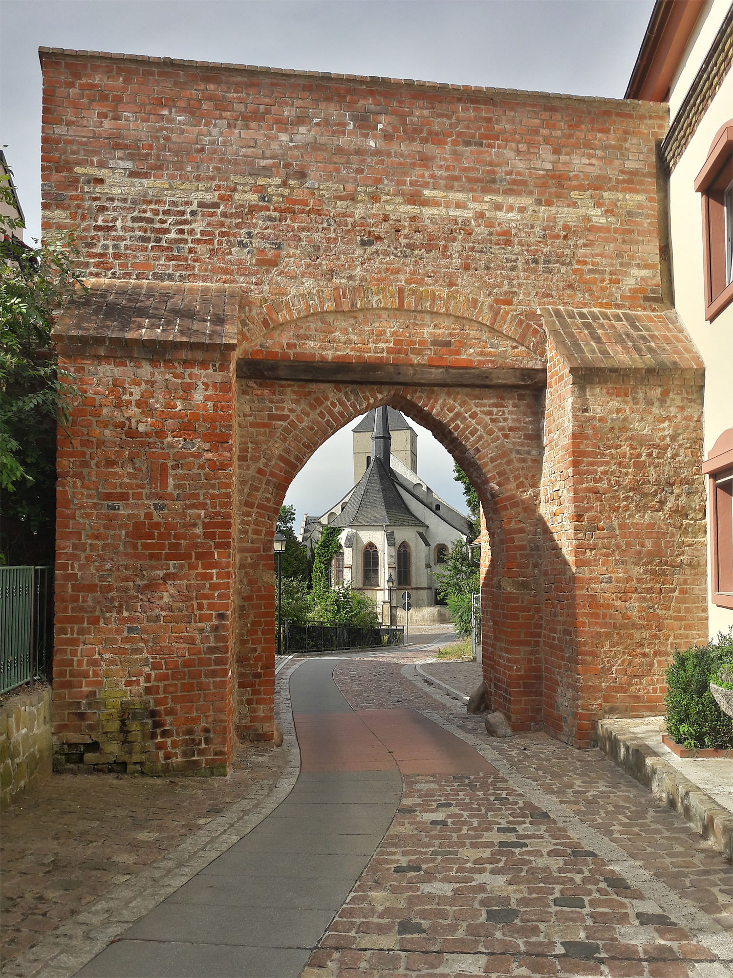 Burgtor auf dem Burgberg Eilenburg